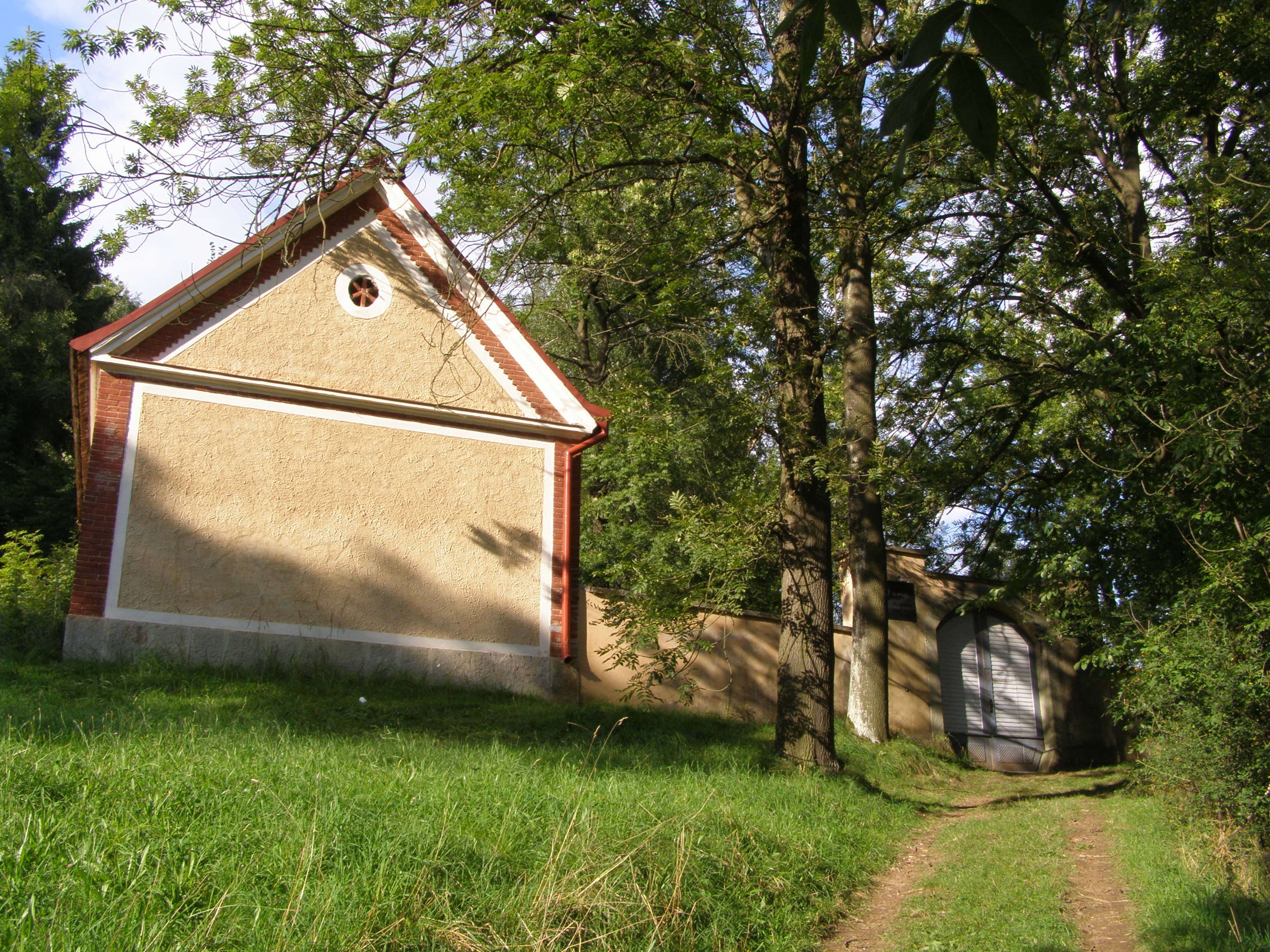 Telč, Staré Město, židovský hřbitov